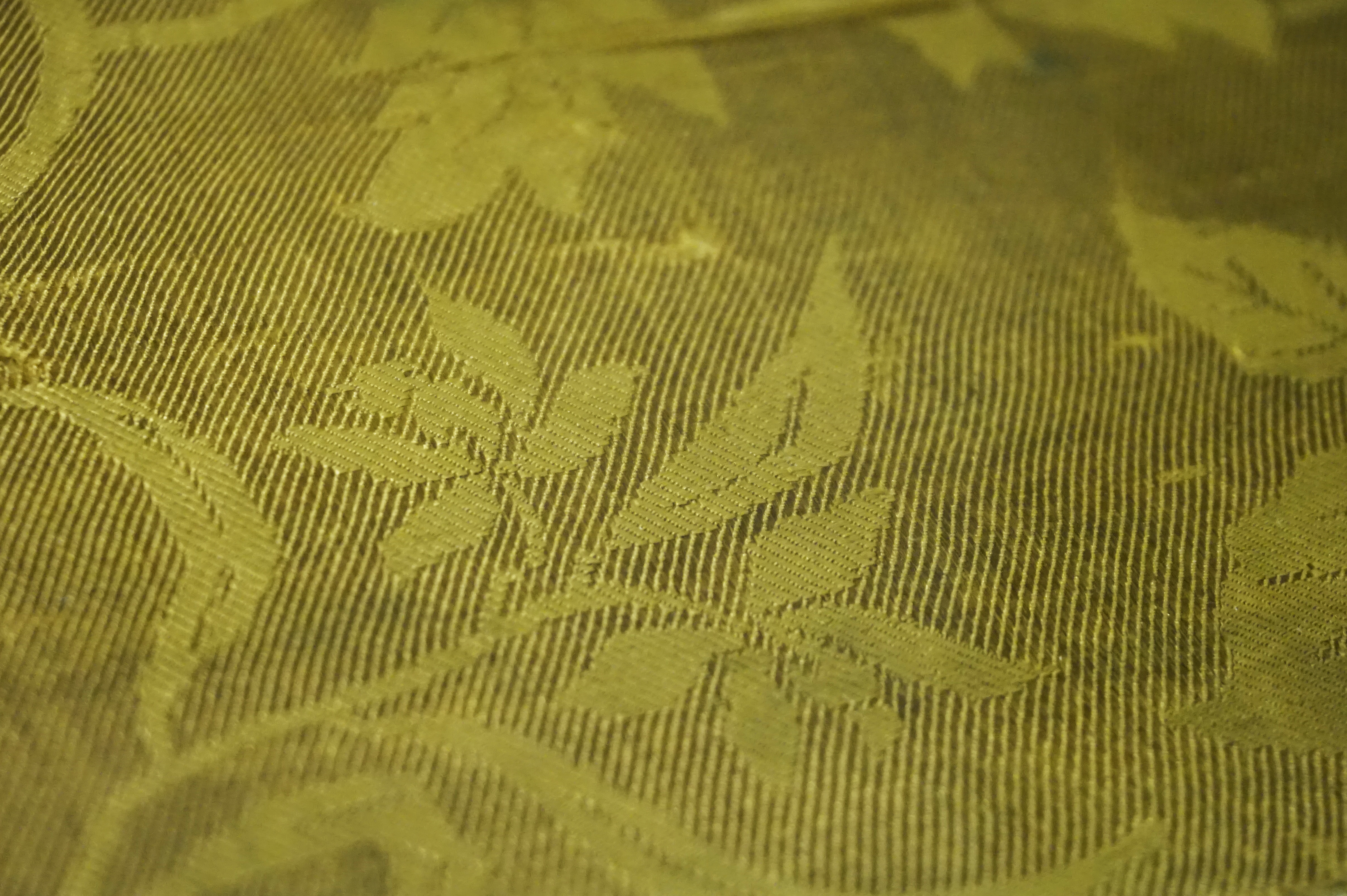 南宋咸淳十年（1274）花卉纹绫。江西德安周氏墓出土，中国丝绸博物馆藏。